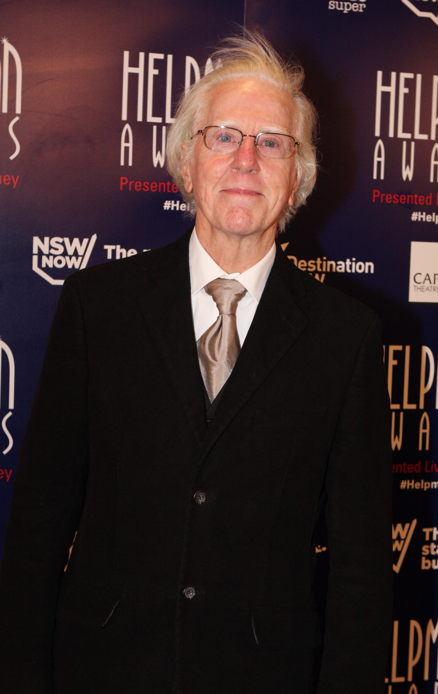 helpmann awards